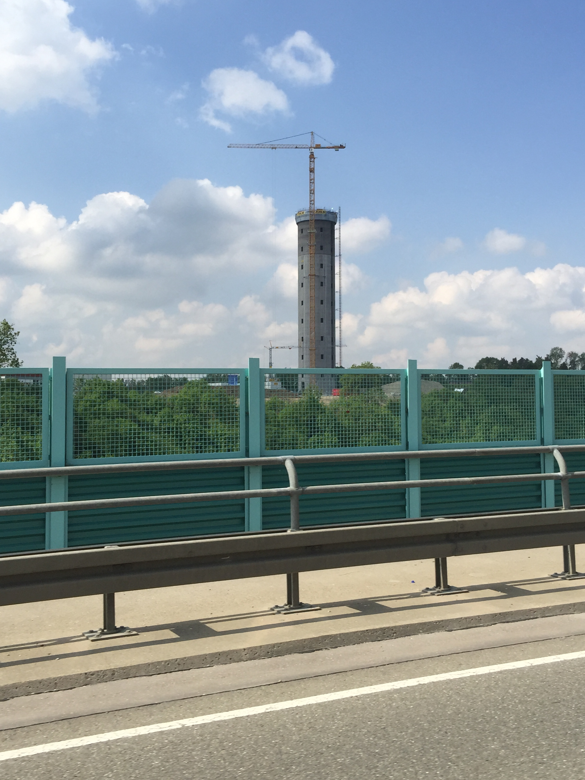 Thyssenkrupp Testturm mit Kletterkran während der Bauphase von der Talbrücke Nordumgehung Rottweil aus gesehen